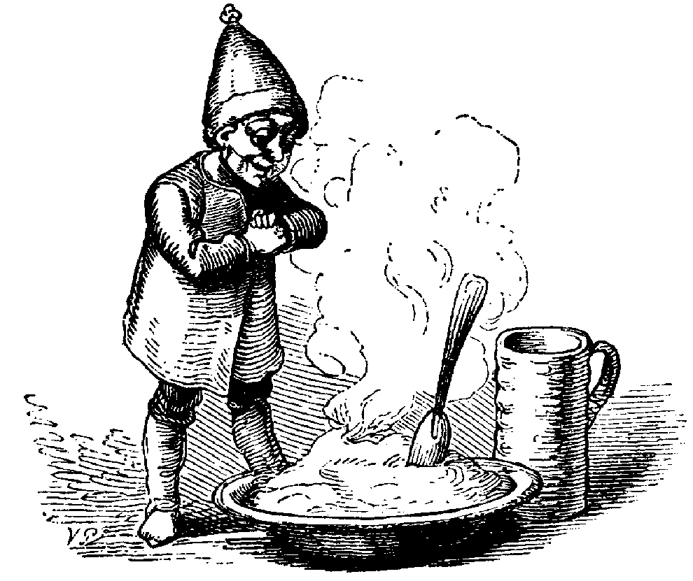 Nisse / Tomte